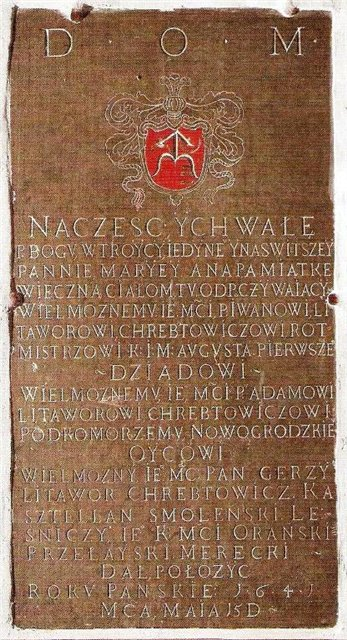 Chreptavičių epitafija Naugarduko Boriso ir Glebo cerkvėje